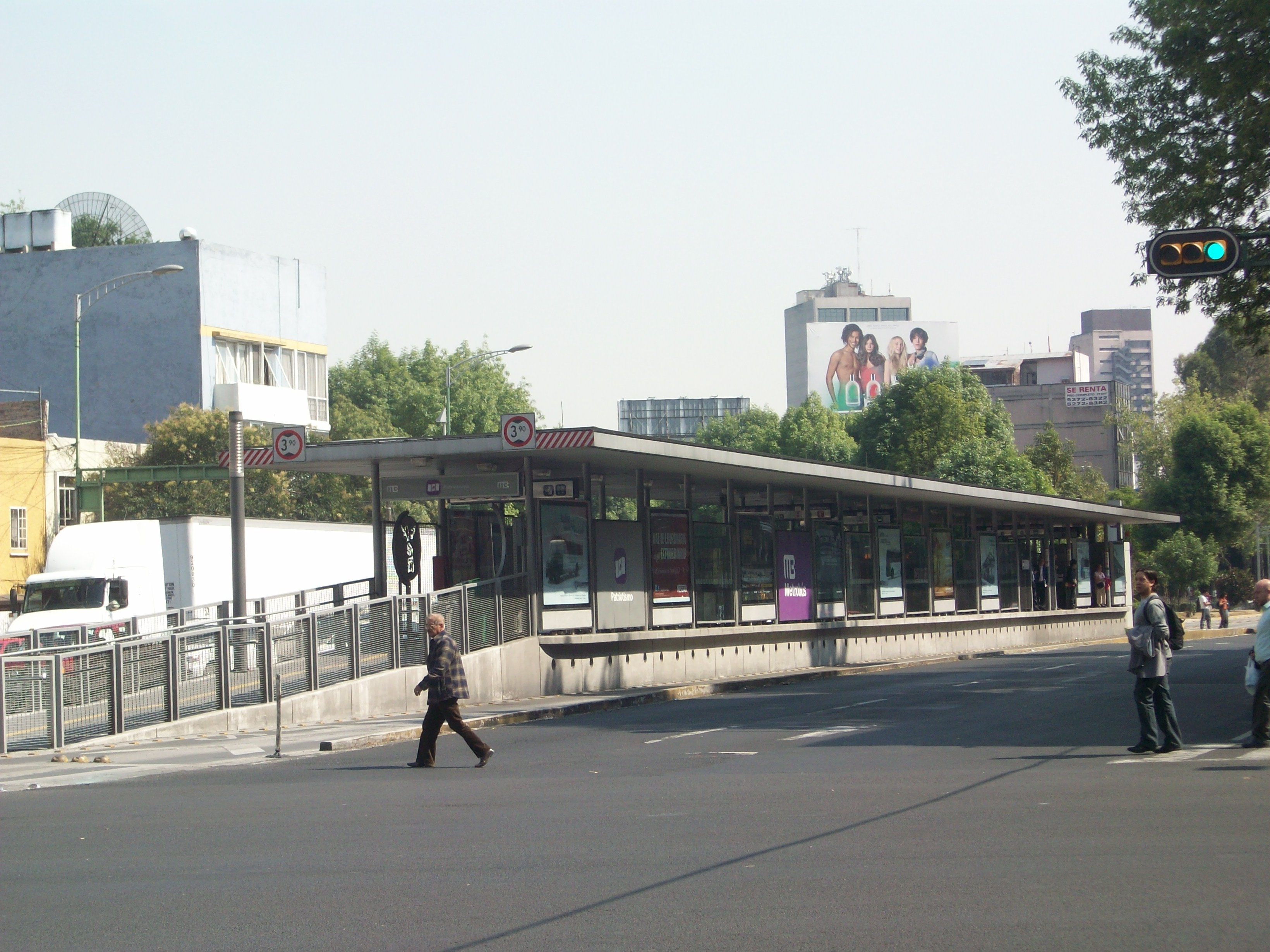 Estacion patriotismo del Metrobus